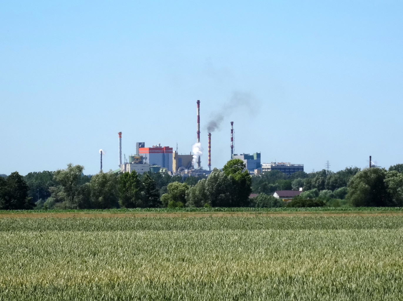 Mondi Świecie S.A., ul. Bydgoska 1 Świecie